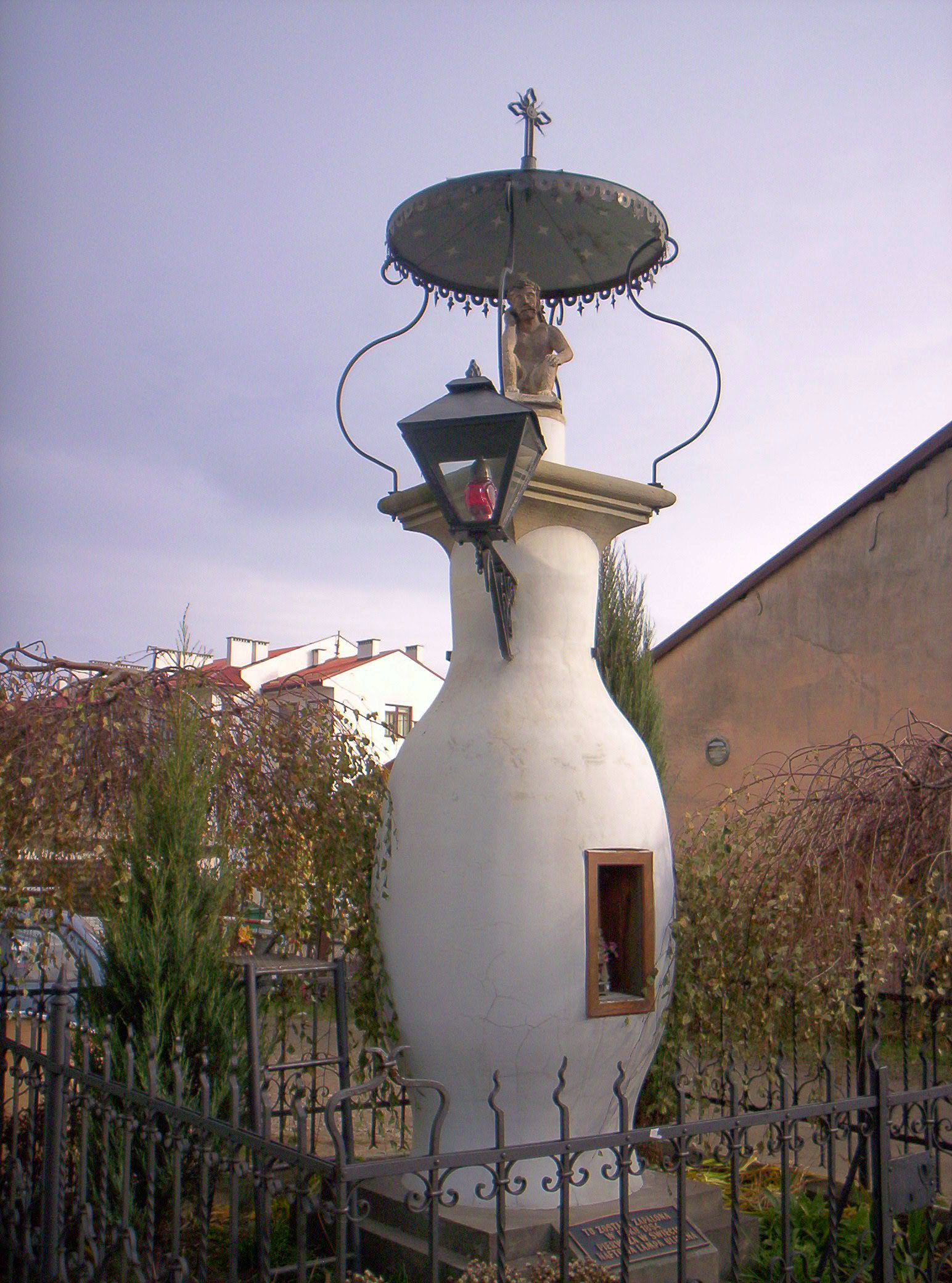 Gorlice. I na świecie uliczna lampa naftowa.